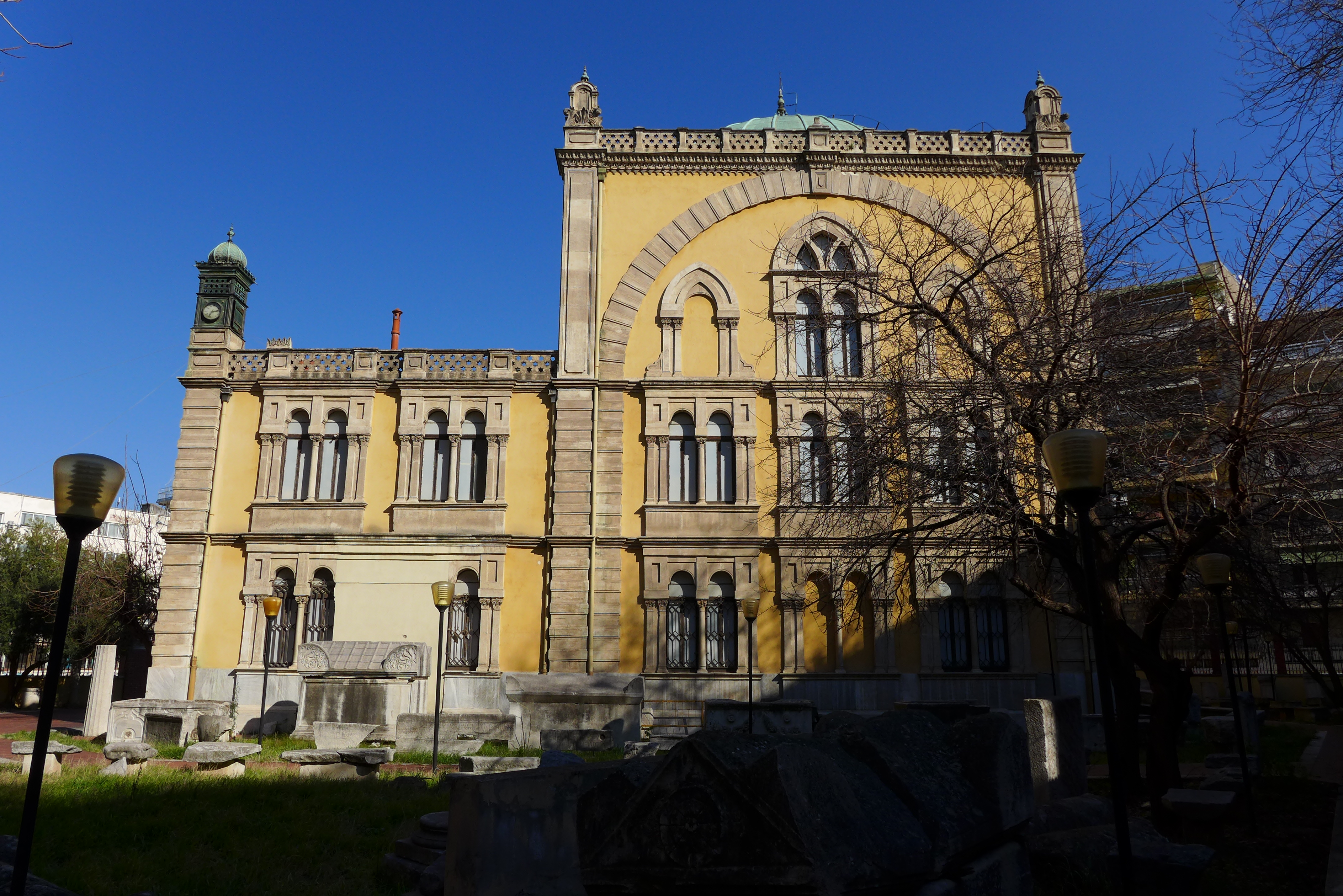 Γενί Τζαμί Θεσσαλονίκης